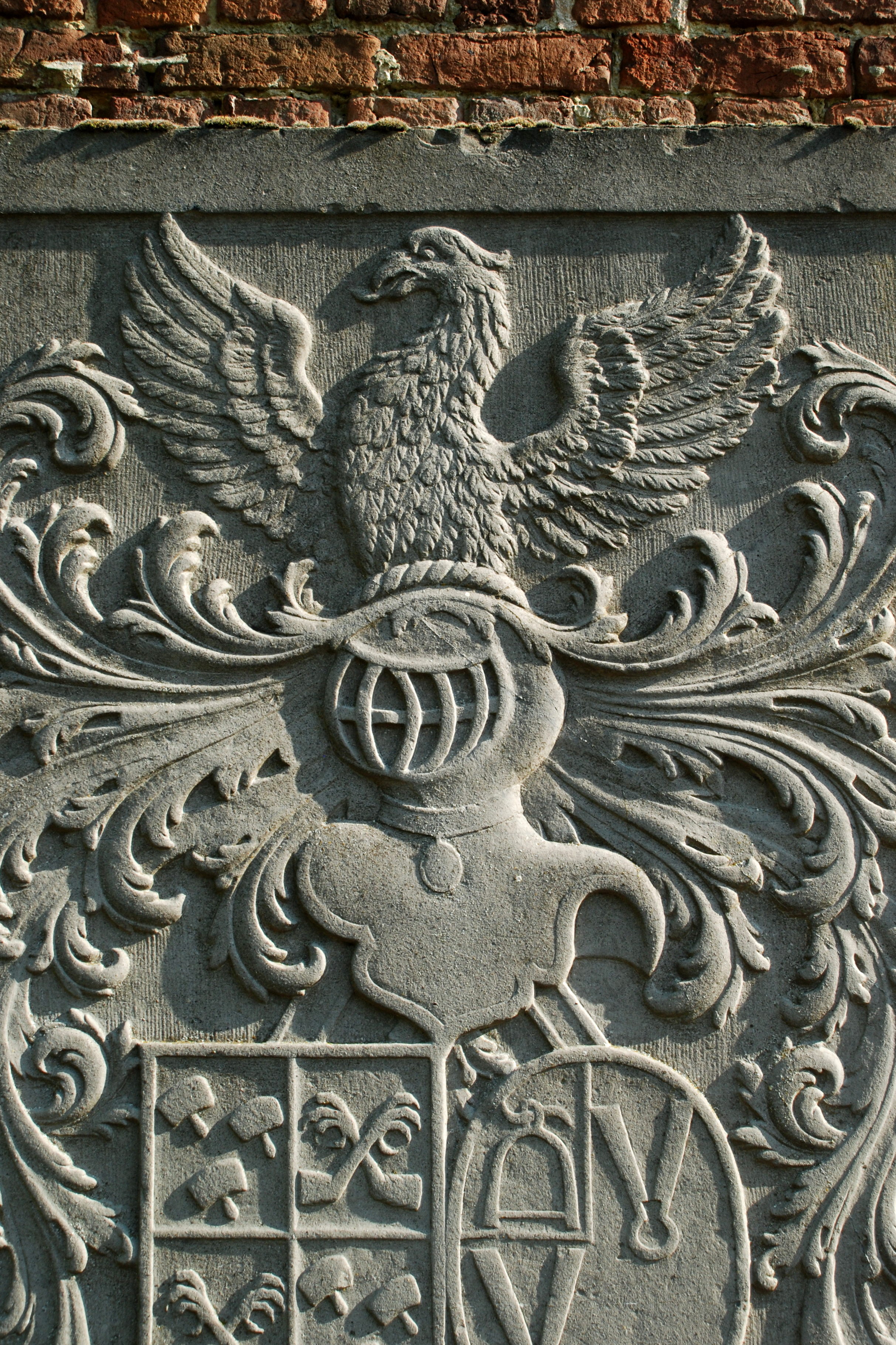 Belgique - Brabant wallon - Mont-Saint-Guibert - Église Saint-Pierre de Corbais - Dalle funéraire de Pierre de Pinchart